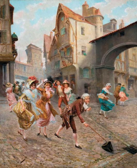 A Wind Gustlabel QS:Lde,"Ein Windstoß"label QS:Len,"a Wind Gust"label QS:Lru,"Порыв ветра"